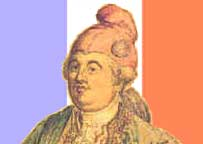 Caricature de Louis XVI (wp-FR), roi de France, coiffé d'un bonnet phrygien. L'image du roi est tirée d'une caricature d'époque, simplement recadrée, en mai 2004, par Jerotito (wp-FR), aujourd'hui Hégésippe Cormier). L'image portait à l'époque le nom Image:Louisaubonnet.jpg. Jerotito a ensuite demandé à Nataraja, le 18 mai 2004, cf. [1], de retoucher à son tour l'image pour poser la silhouette du roi sur un fond reproduisant le drapeau tricolore français, ce que Nataraja a fait en recréant l'image sous le nouveau nom Image:Rév-fran0.jpg.